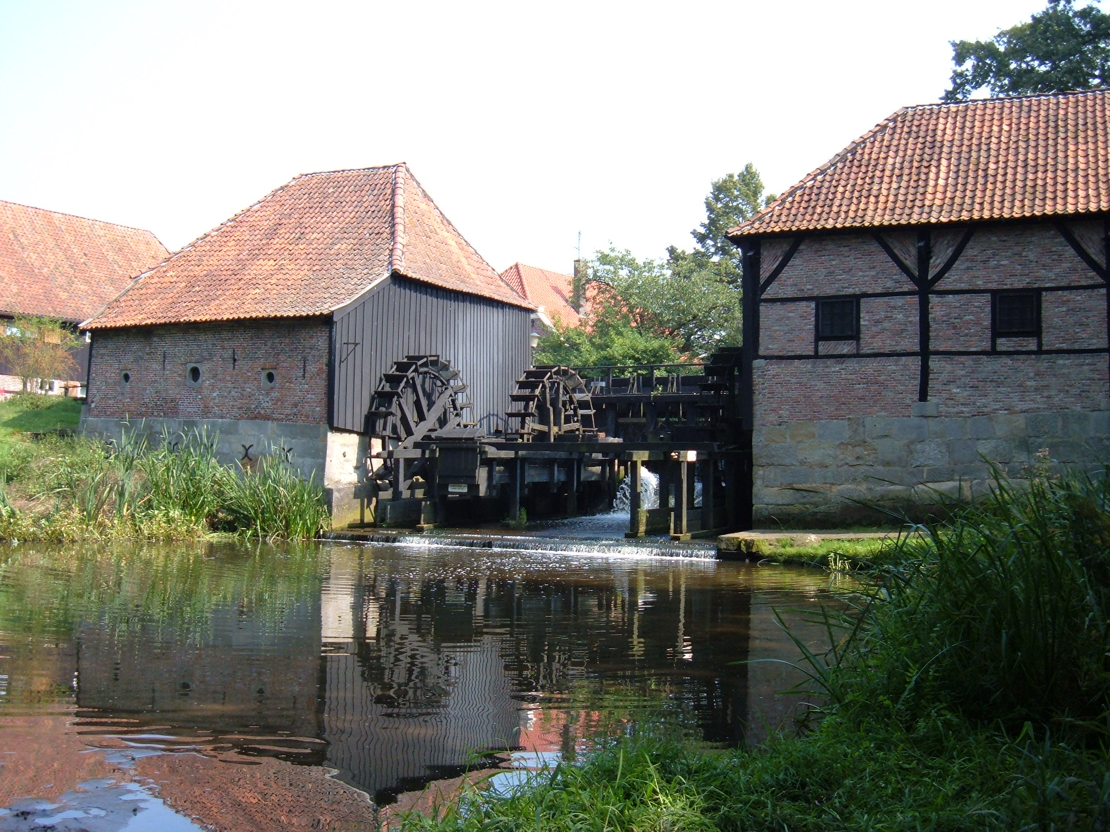 Watermill "Oostendorpermolen", Haaksbergen, The Netherlands.